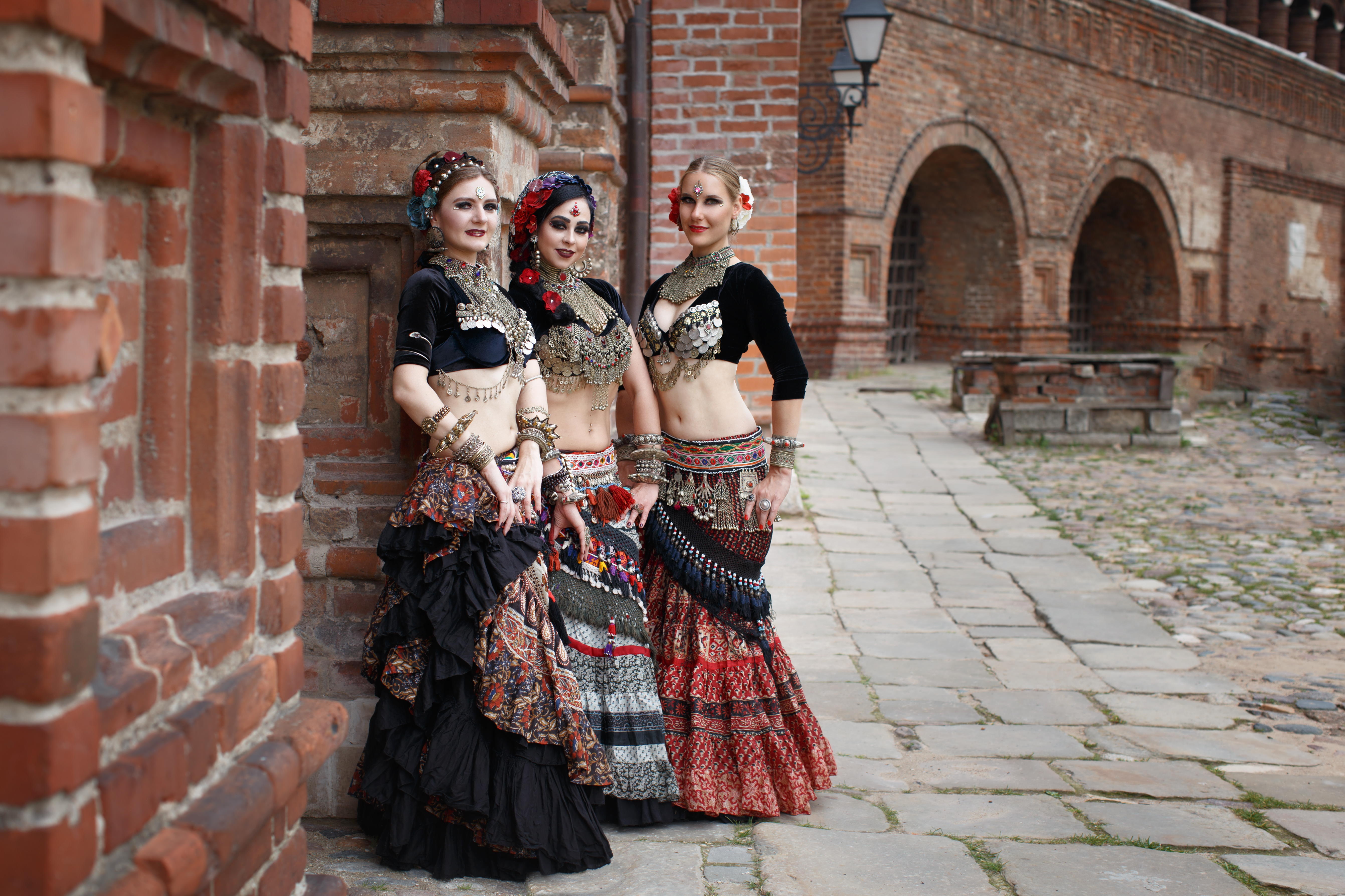 Костюмы ATS